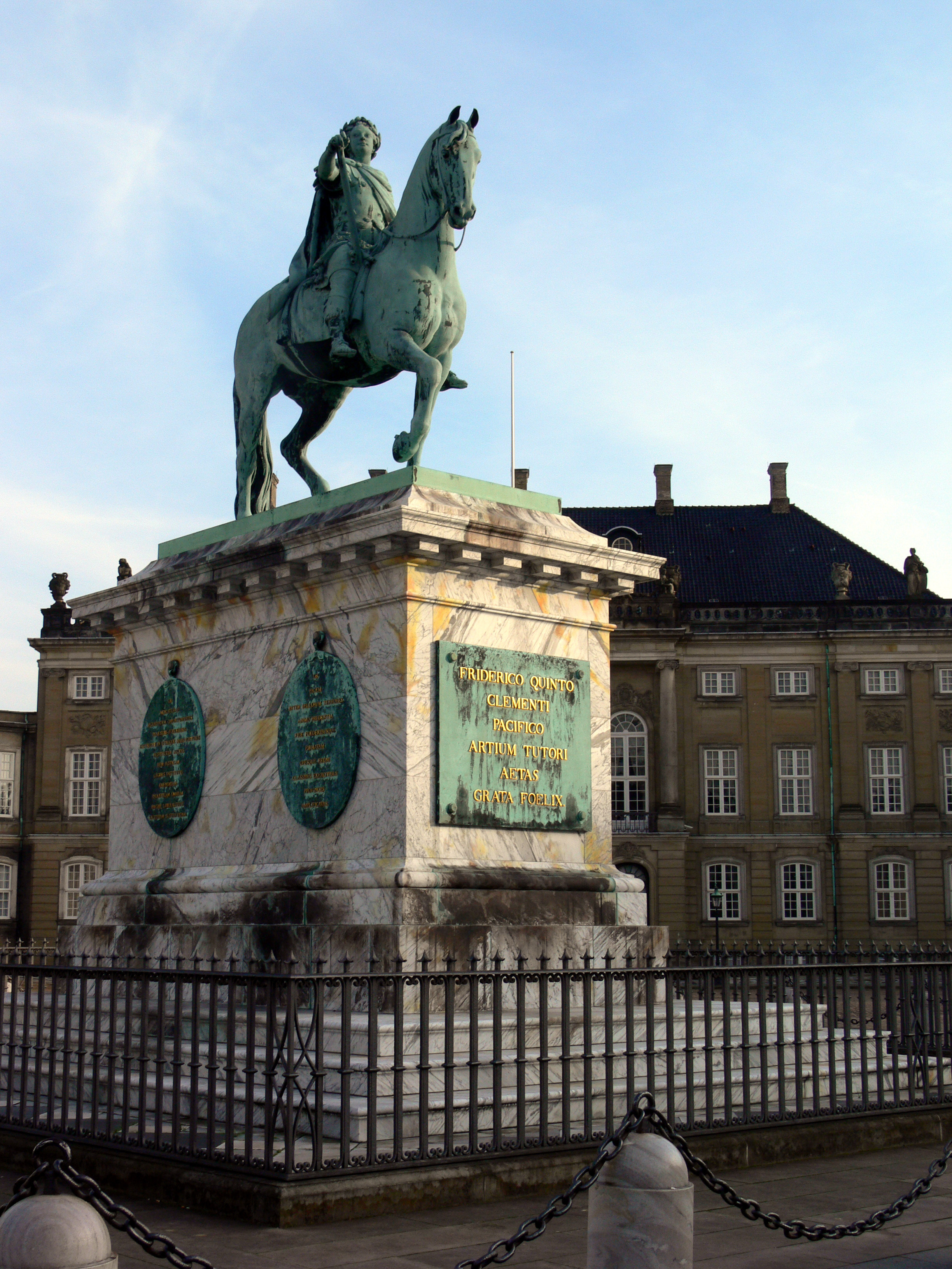 Friedrich V., König von Dänemark und Norwegen 1746-1766.